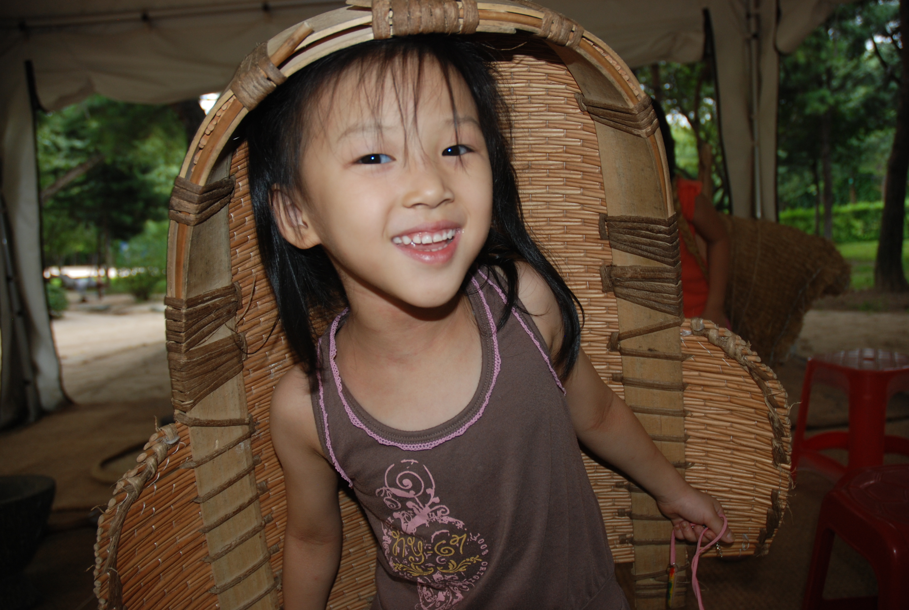 불순물을 걸러내는 키